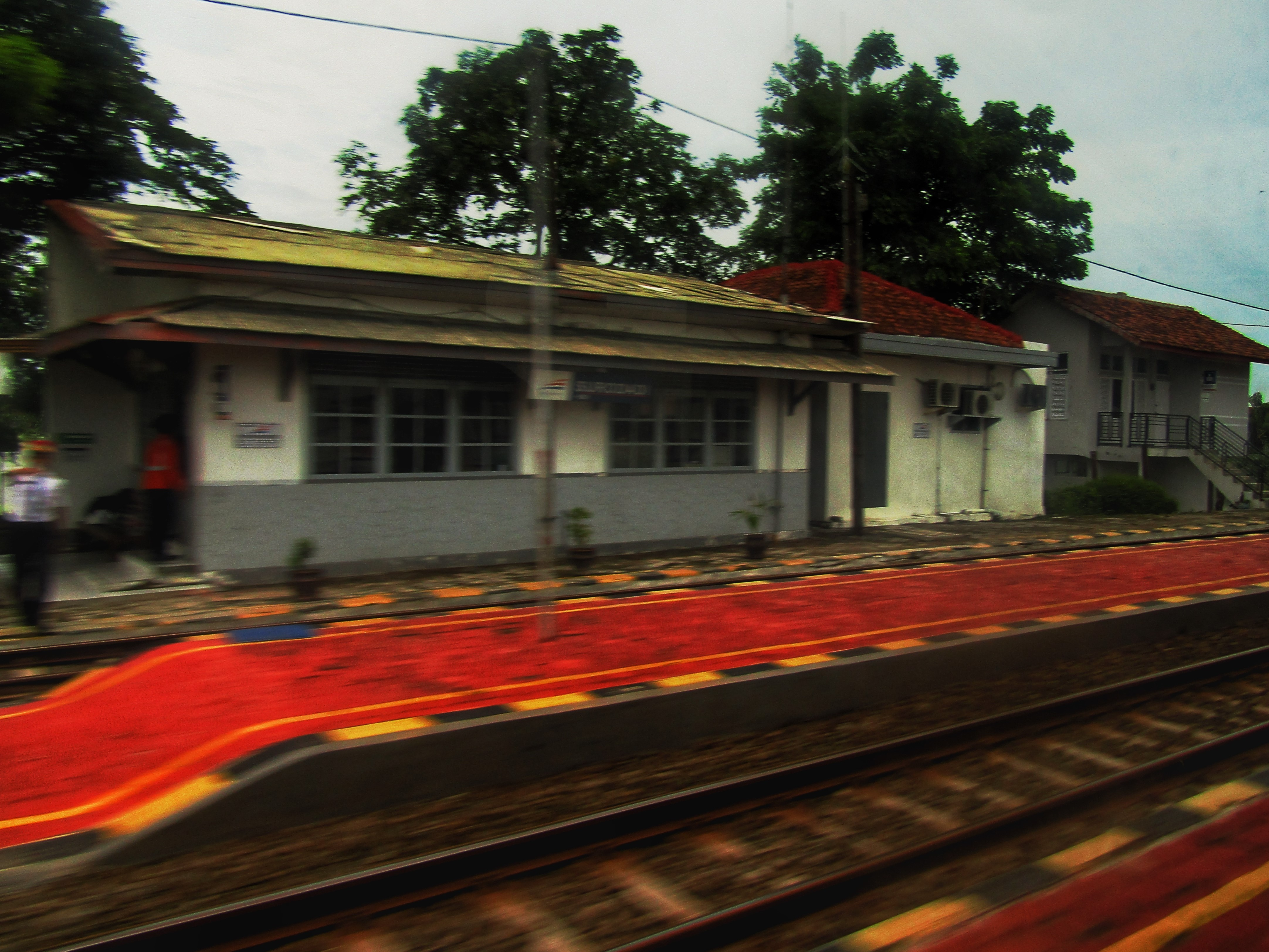 Tampak peron bangunan Stasiun Surodadi Tegal, 2019, dengan PPKA tunjuk-sebut Semboyan 1 di kiri.